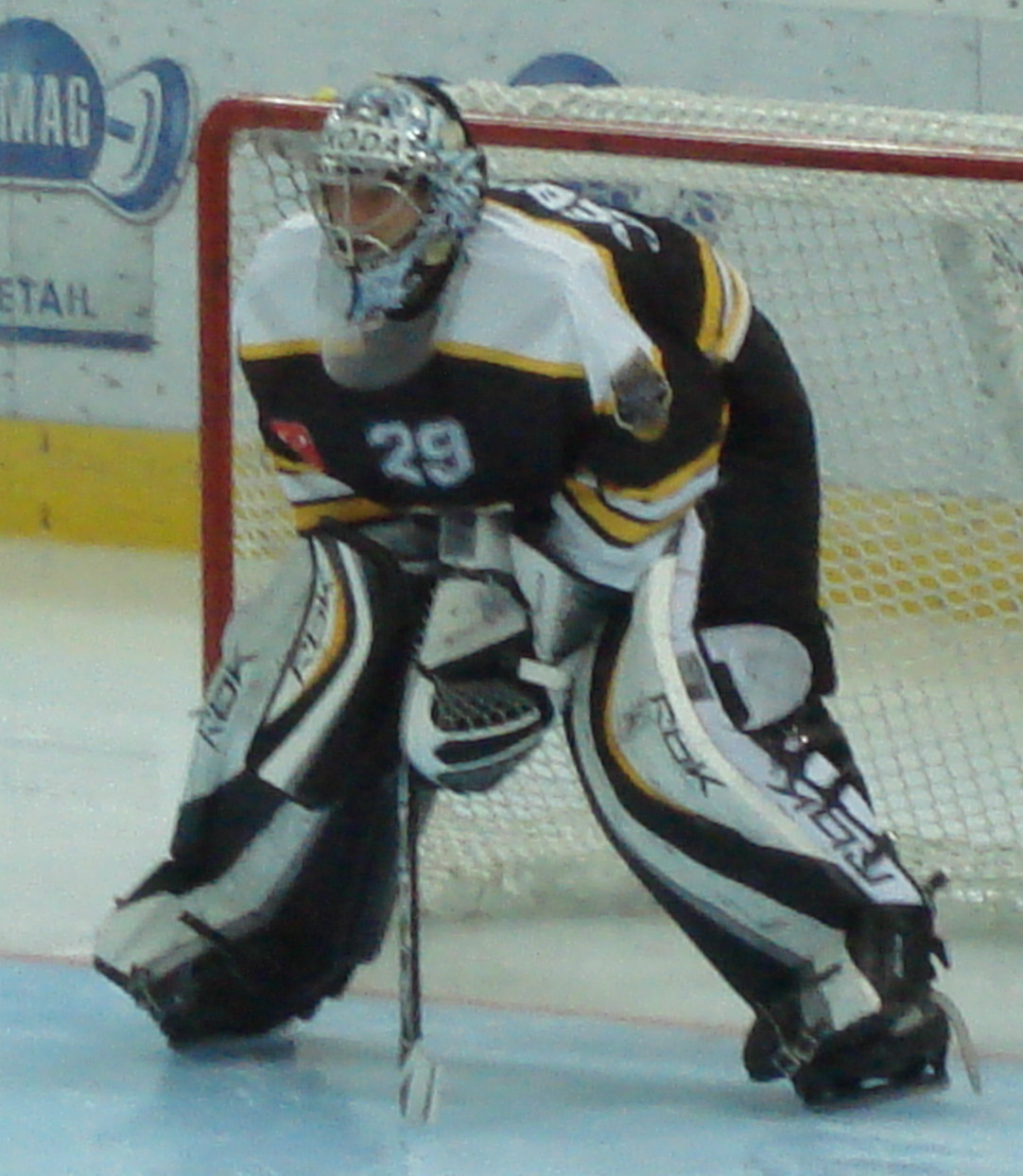 David Aebischer avec le HC Lugano lors d'un match de préparation face aux Rapperswil-Jona Lakers en 2008